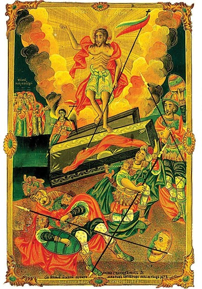 Икона на Възкресение Христово от Генчо Филипов